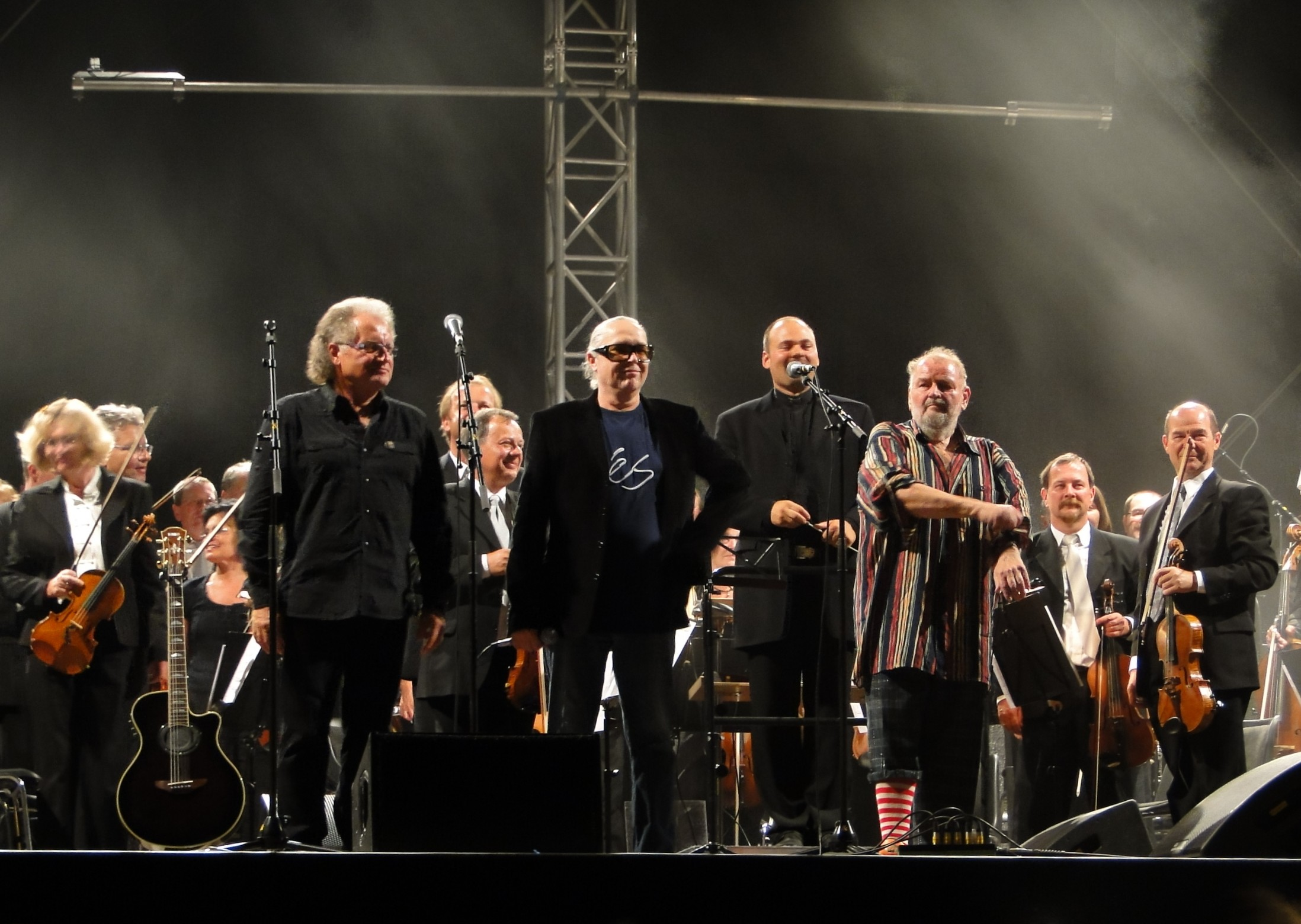 Gisbert Koreng, Stephan Trepte und Peter „Mampe“ Ludewig (v. l. n. r.), Sänger der Band electra, auf einem Konzert im August 2009.